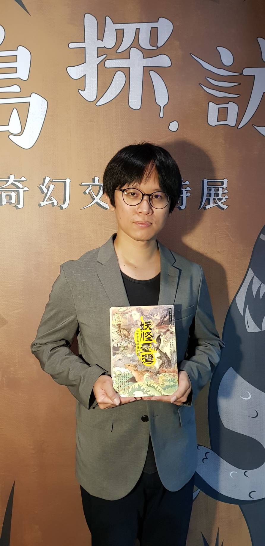 作家：何敬堯，地點：台中文學館，活動：鬼島探訪：臺灣妖怪奇幻文藝特展，攝於2019-05-04。